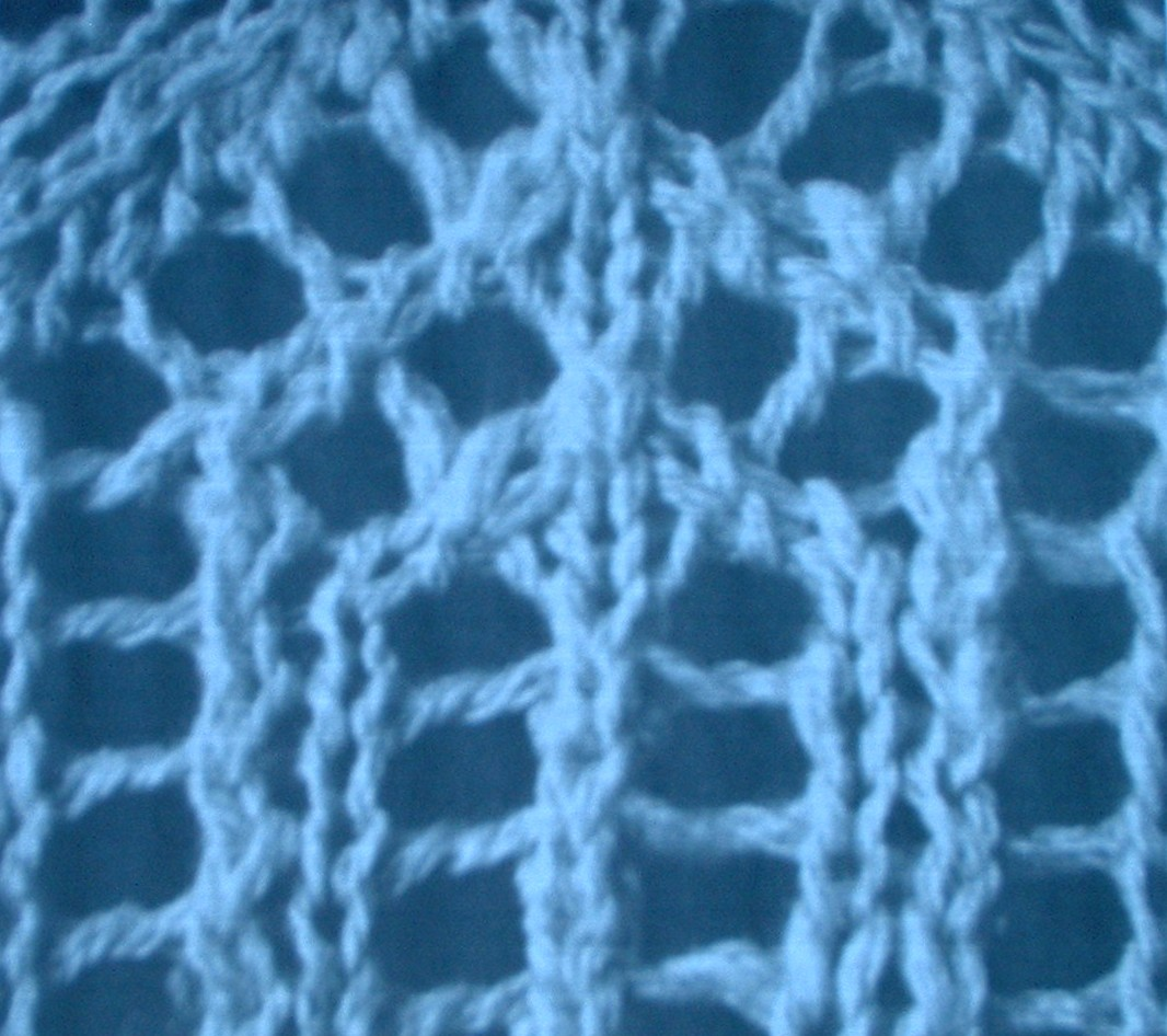 Petinetmuster im Gestrick